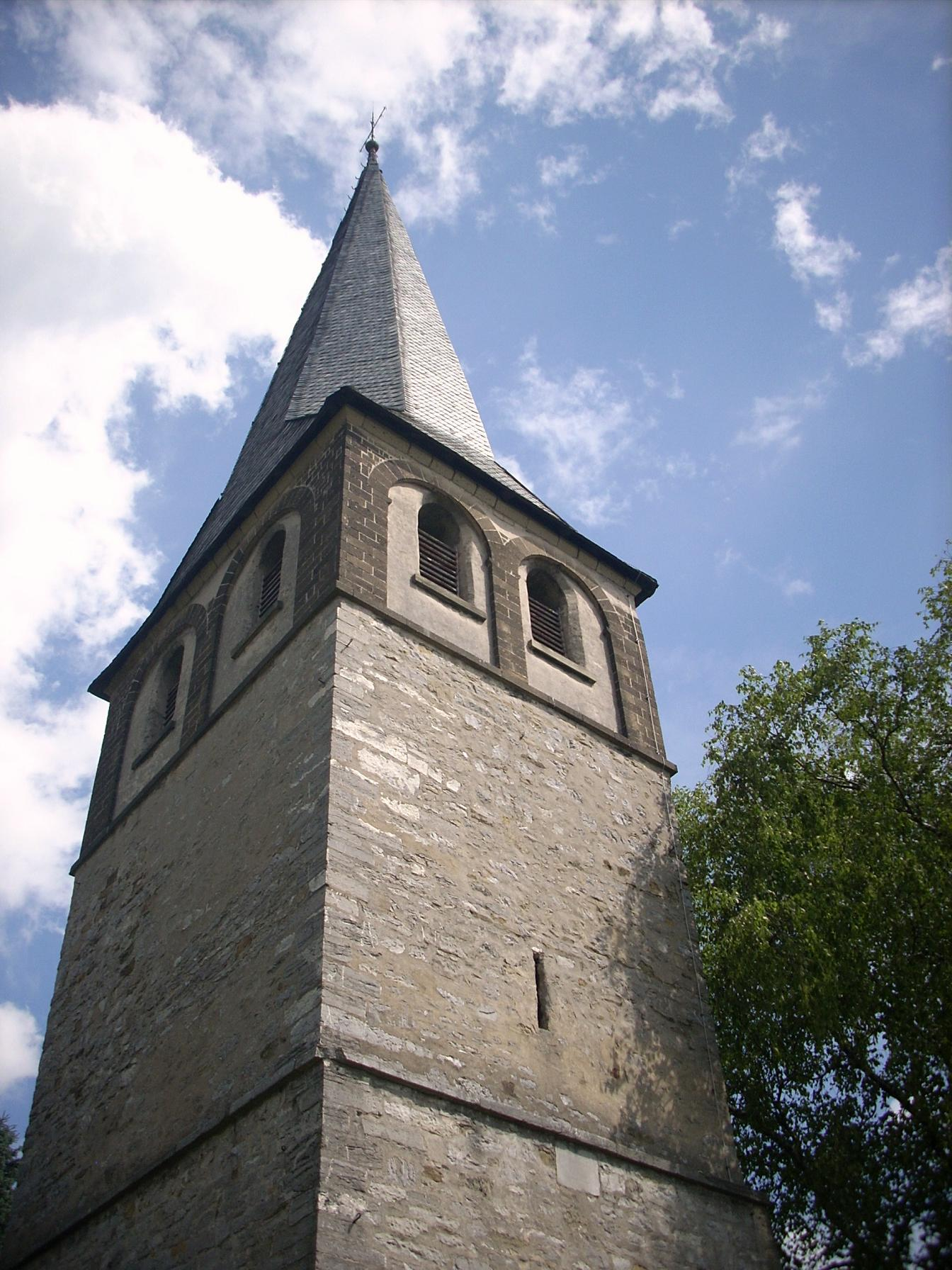 Haan-Gruiten, Alter Kirchturm